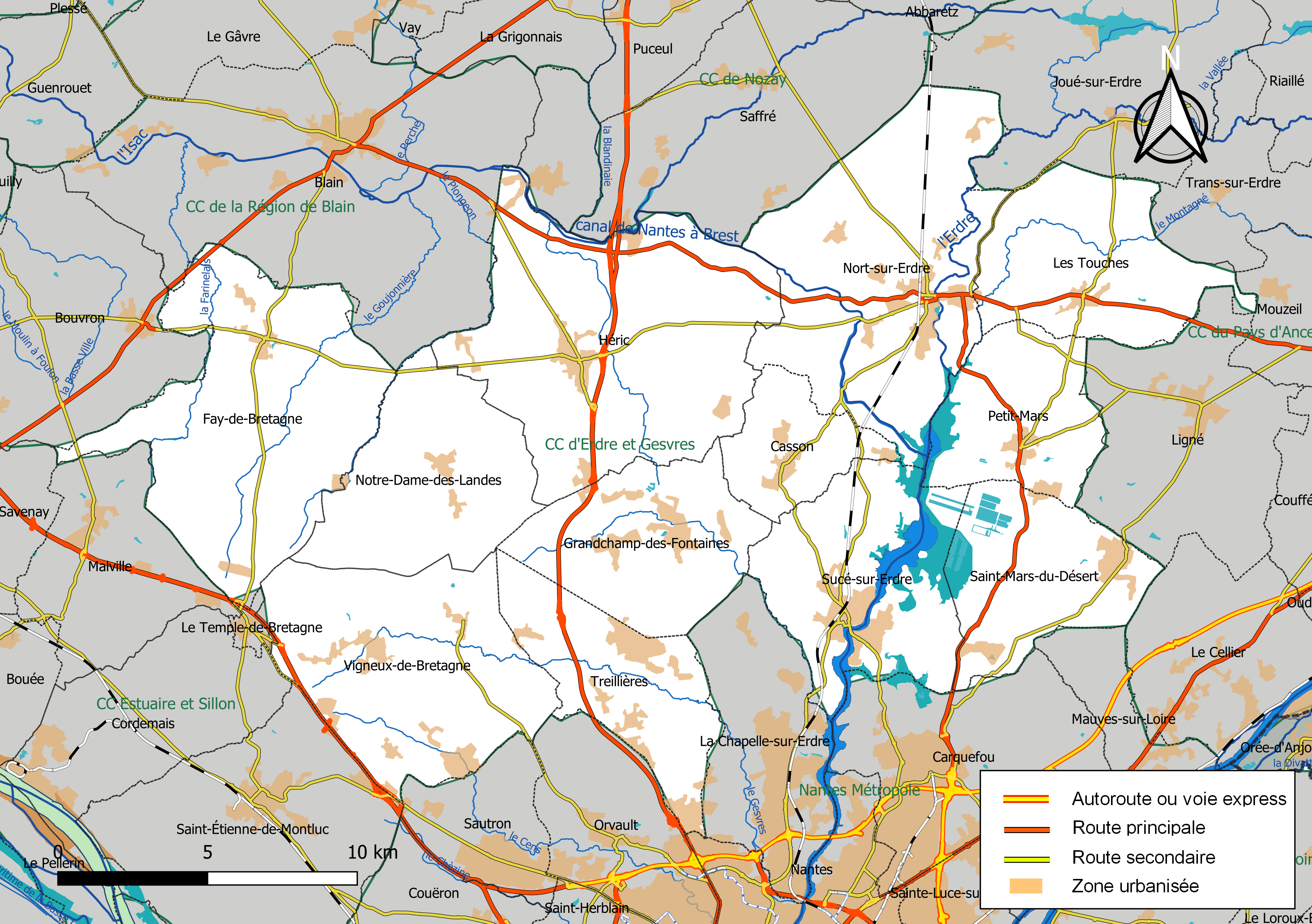 Carte géographique de la Communauté de communes d'Erdre et Gesvres, département de la Loire-Atlantique, France. Composition au 1er janvier 2019.